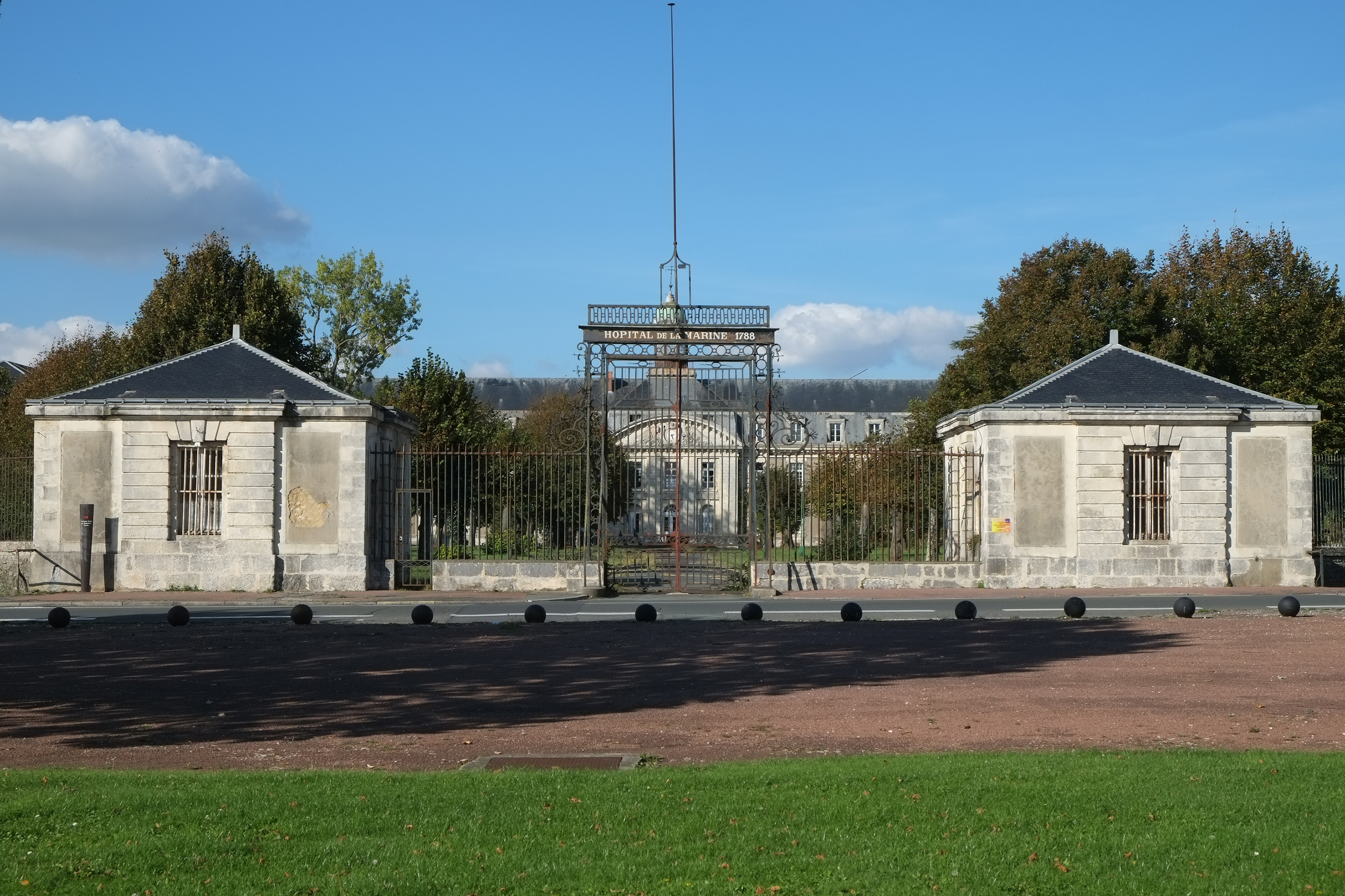 Hôpital de la Marine Rochefort Charente-Maritime France